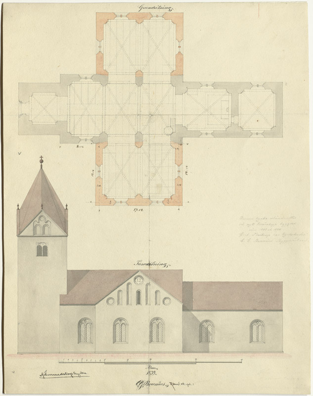 Grundplan och sydfasad. Förslag till nytt tvärskepp. Ritning av Carl Georg Brunius 1839, tillhörande Konvolut 6, pl. 1. Motiv: Asmundtorps kyrka Kategori: (01) Exteriörer, Ritning Grundplan och sydfasad. Förslag till nytt tvärskepp. Ritning av Carl Georg Brunius 1839, tillhörande Konvolut 6, pl. 1.